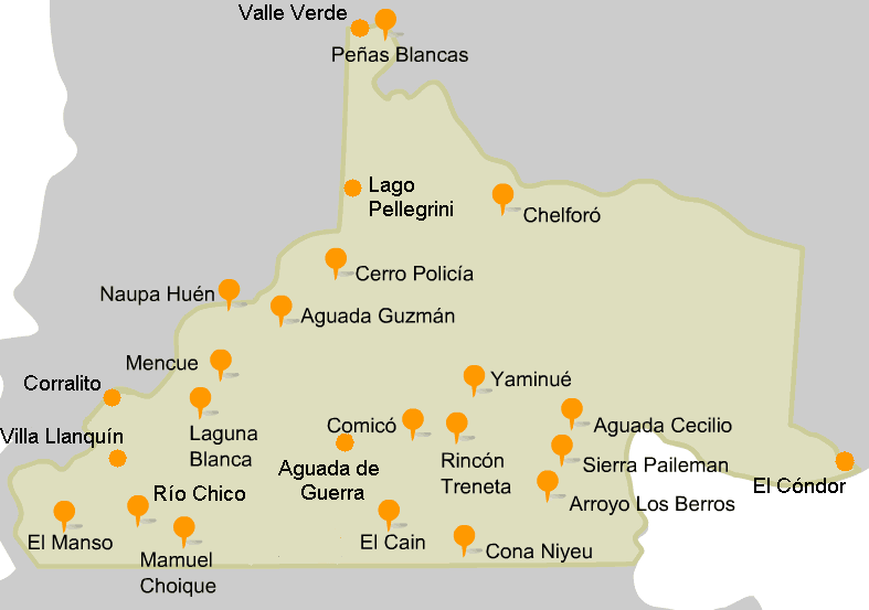 Mapa de las sedes del Centro de Educación Media Rural en entorno virtual (CEM Rural)